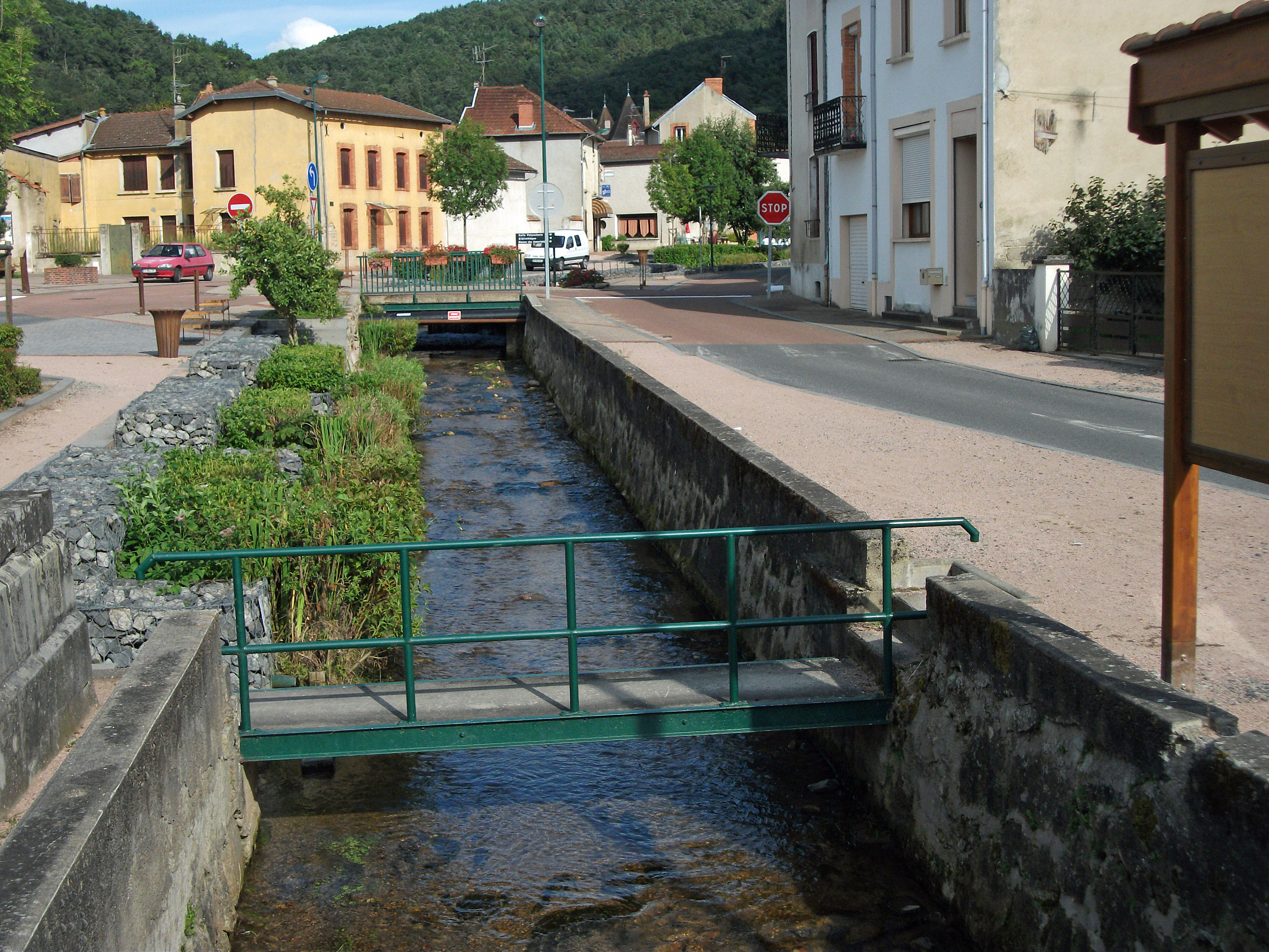 Ruisseau Le Darot coulant dans Mariol